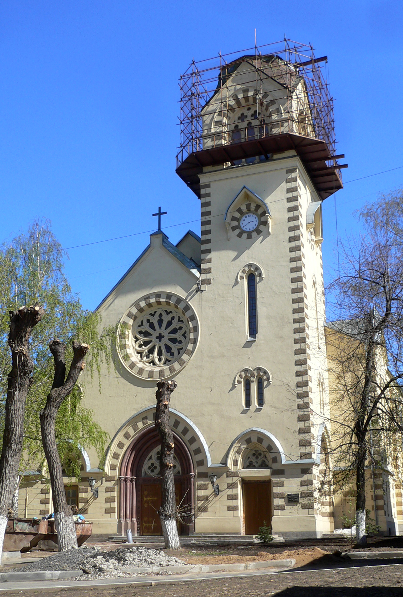 Evangelisch-Lutherische Peter- und Paulskirche zu Moskau